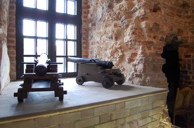 Мірскі замак. Гарматы